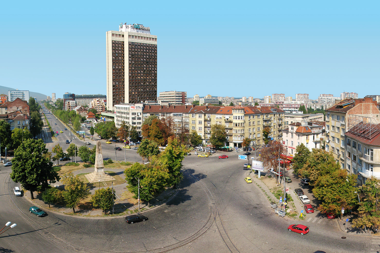 The Russian Monument square and Rodina hotel. Руски паметник и хотел Родина.